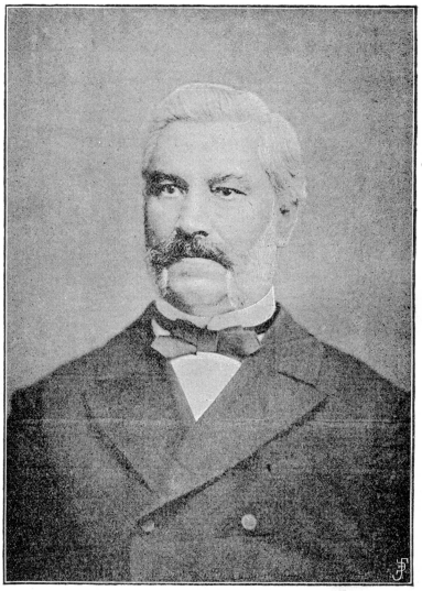 Теофан Лебединцев.